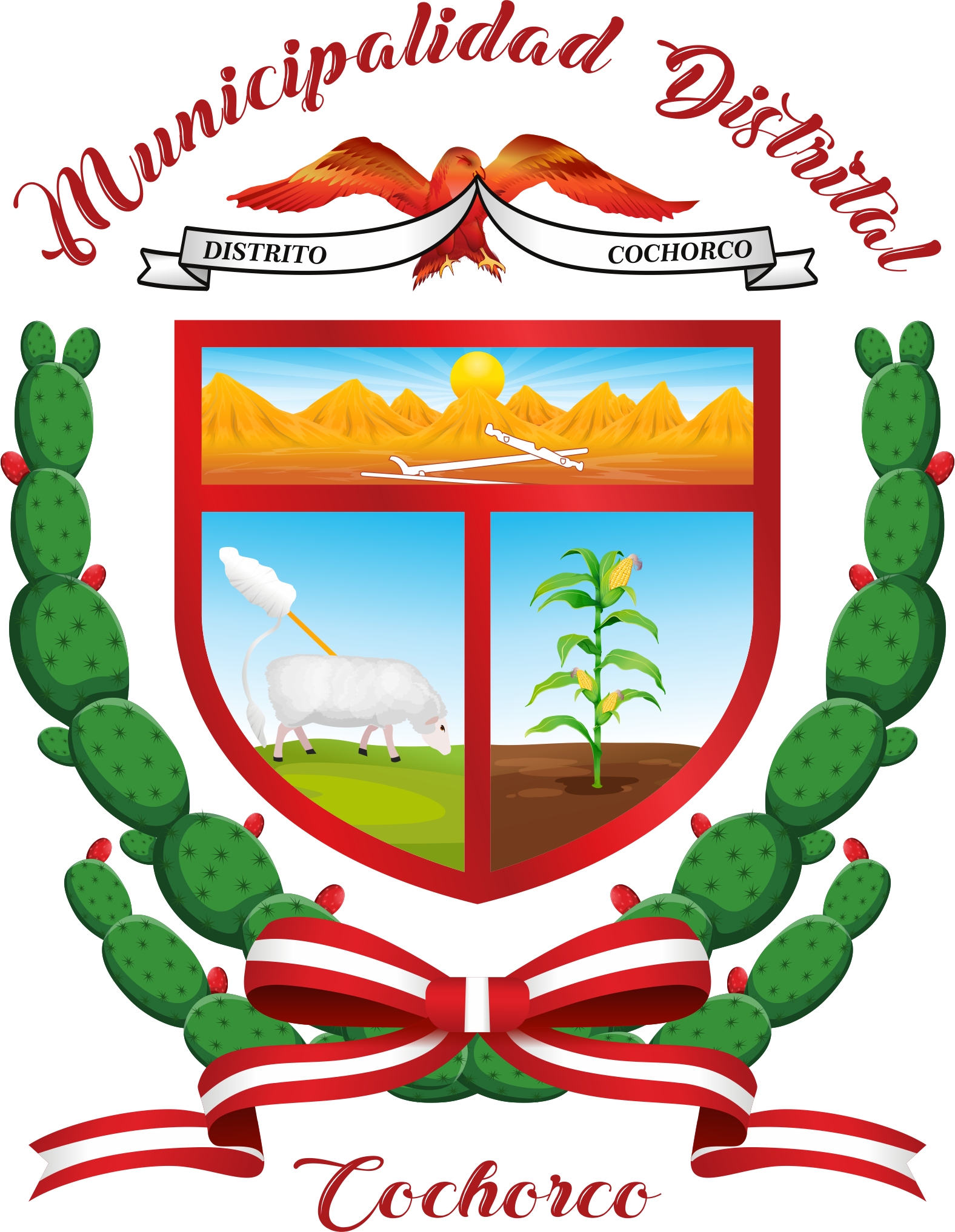 El Distrito de Cochorco es uno de los ocho que conforman la Provincia de Sánchez Carrión, ubicada en el Departamento de La Libertad, bajo la administración del Gobierno regional de La Libertad.